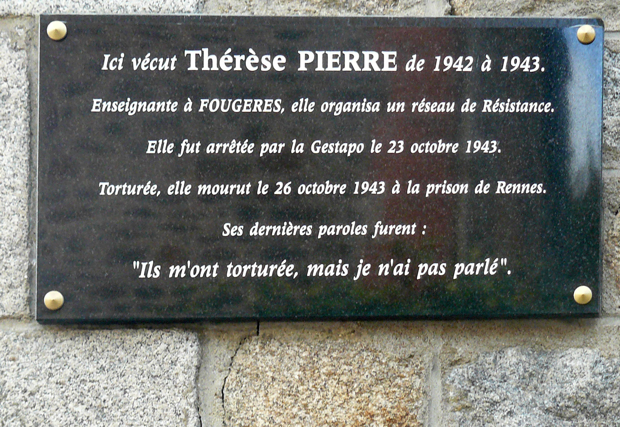 Le 27 octobre 2013, une plaque est dévoilée sur la façade de la maison que Thérèse PIERRE habita, au 32, rue des Prés à Fougères